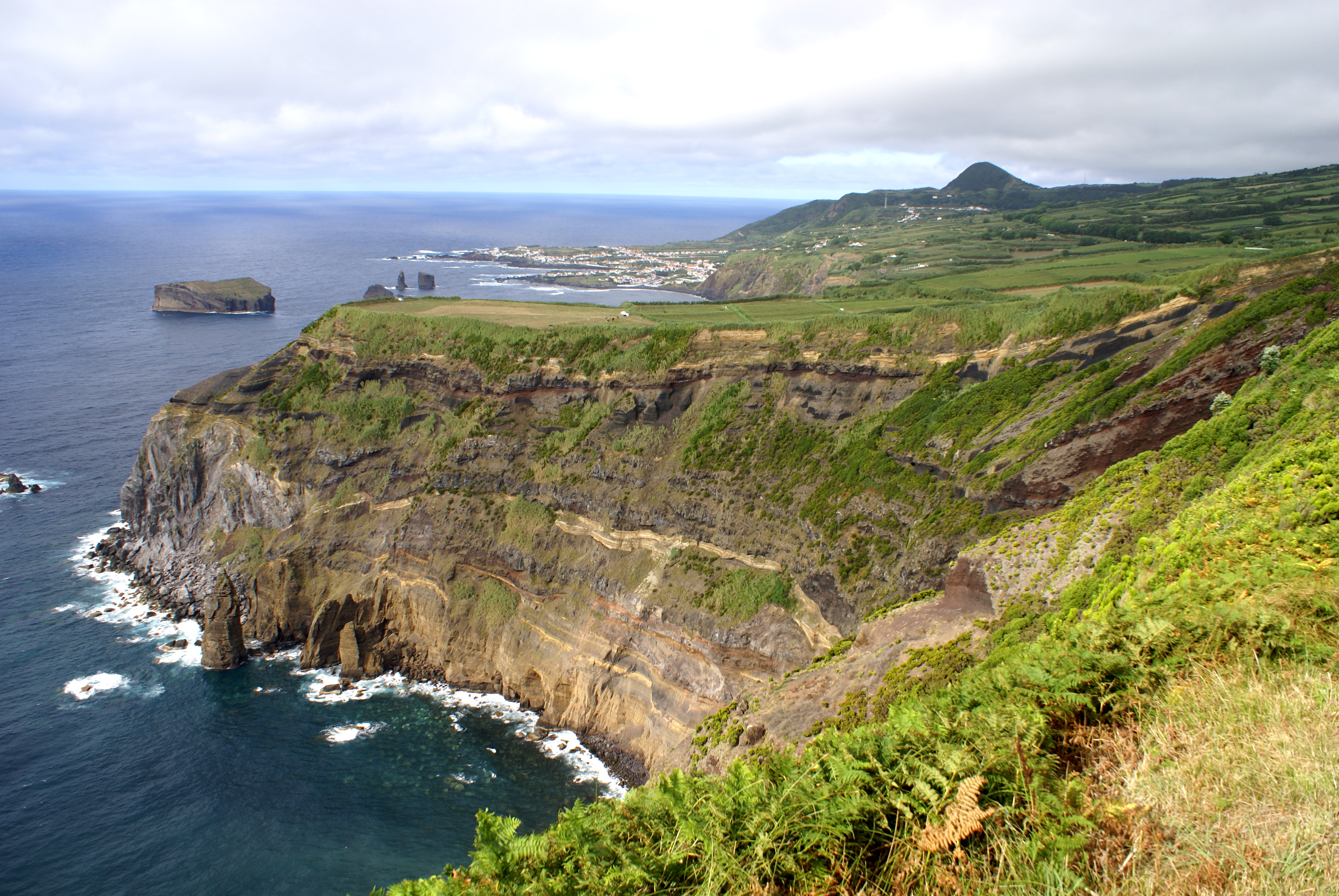 Miradouro da Ponta do Escalvado, Mosteiros, ilha de São Miguel, Açores